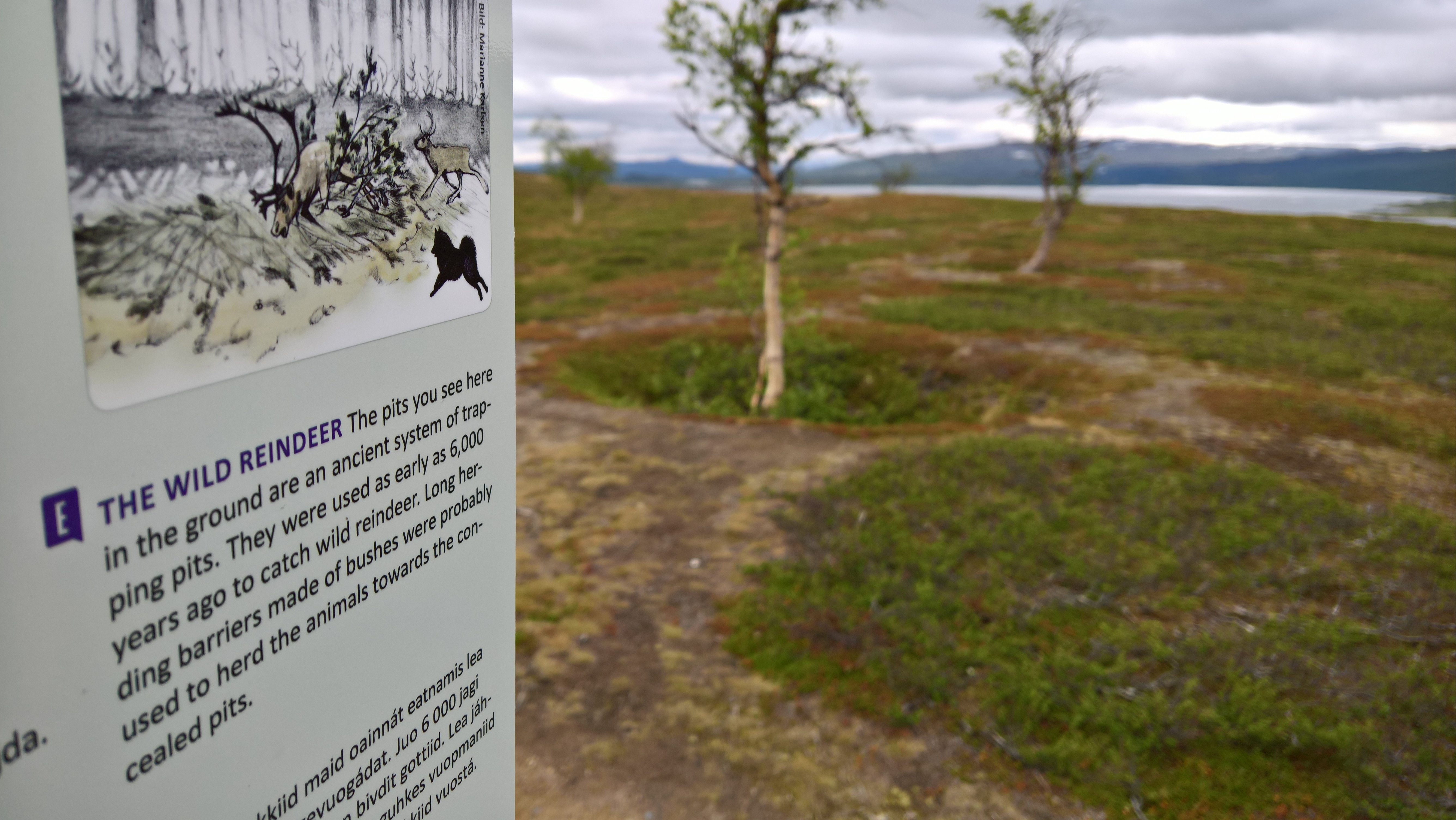 popis a v pozadí jsou vidět chytací jámy na trojmezí NP Sarek, Stora Sjofallet a Padjelanta na území NP Stora Sjofallet při mé cestě z NP Abisko do 300 km vzdálené vesnice Sulitjelma v Norsku přes 4 národní parky.